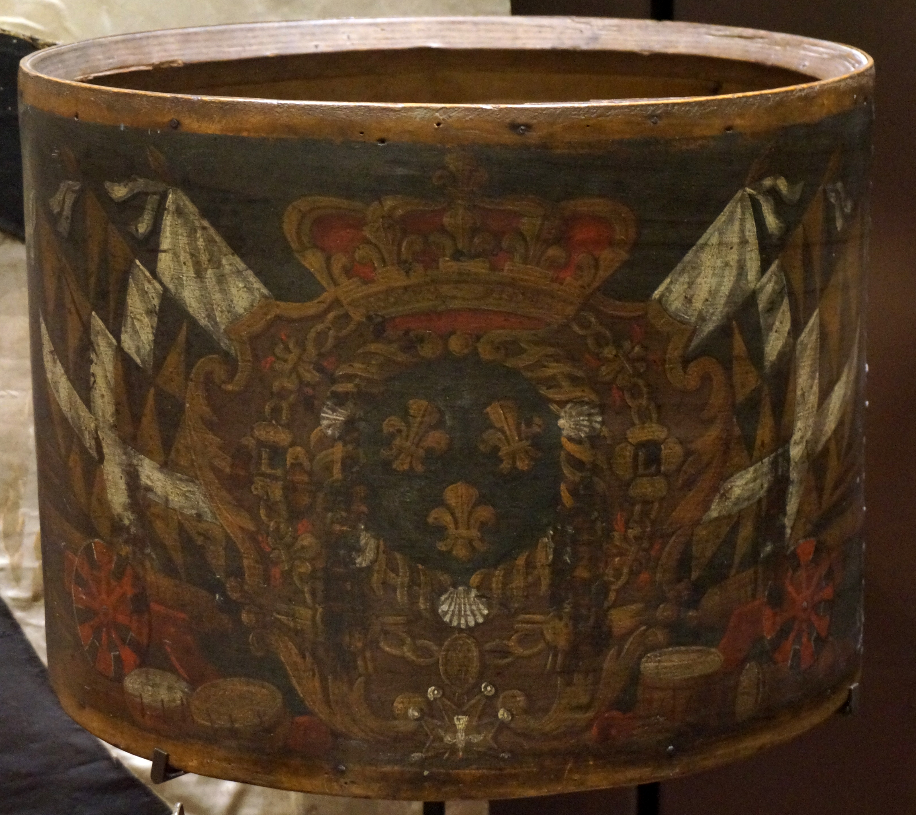 Musée de l'Armée - collection.